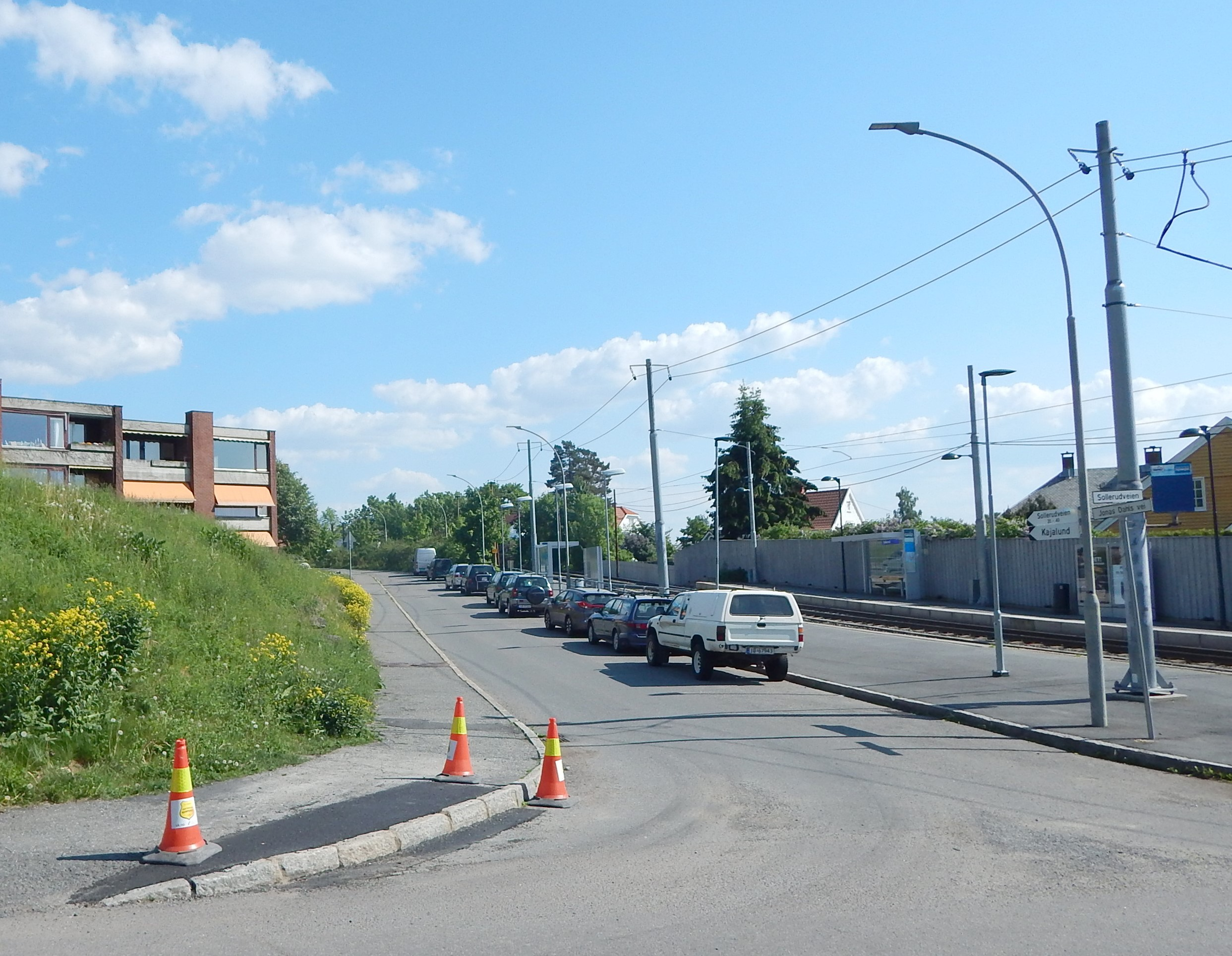 Jonas Dahls vei